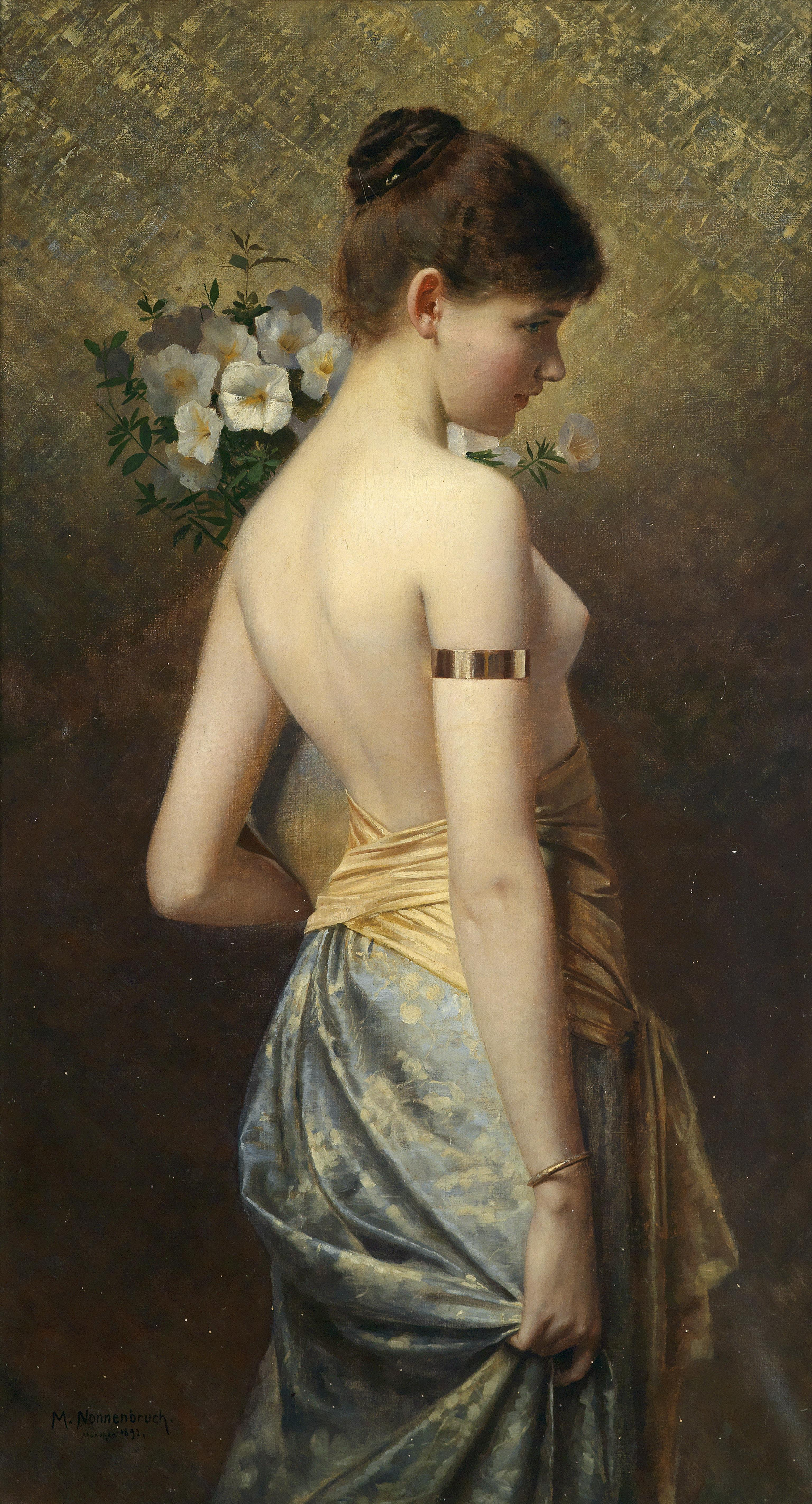 Flora